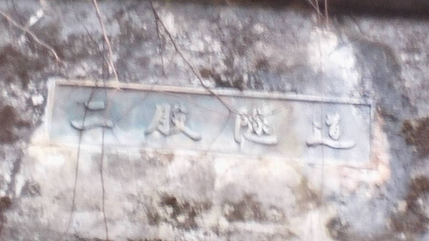 二股街道。岐阜県八百津町。戦時中に中国人と朝鮮人を強制連行・強制労働させて掘ったとされるトンネル